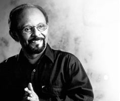 A.D. Pirous, seniman Indonesia